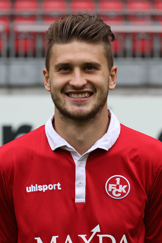 Mateusz Klich